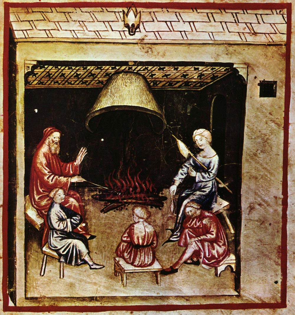 Tacuina sanitatis (XIV century) 0-aspetti di vita quotidiana, veglia,Taccuino Sanitatis, Ca